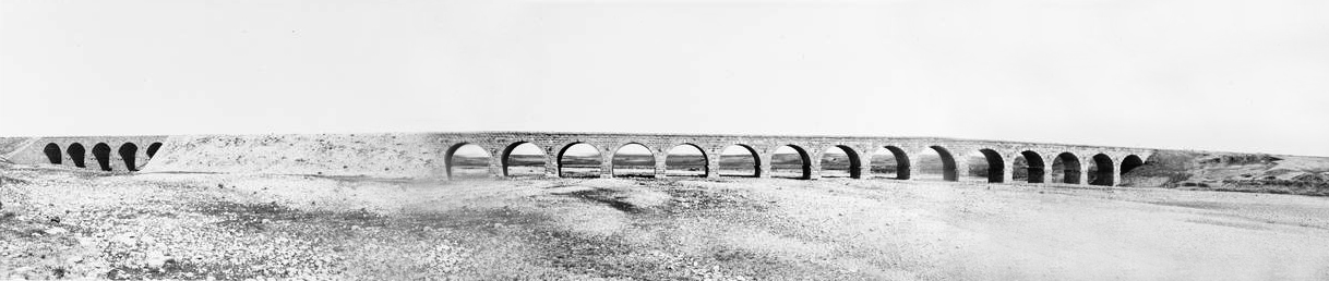 מסילת הרכבת בבאר שבע, מרץ 1919